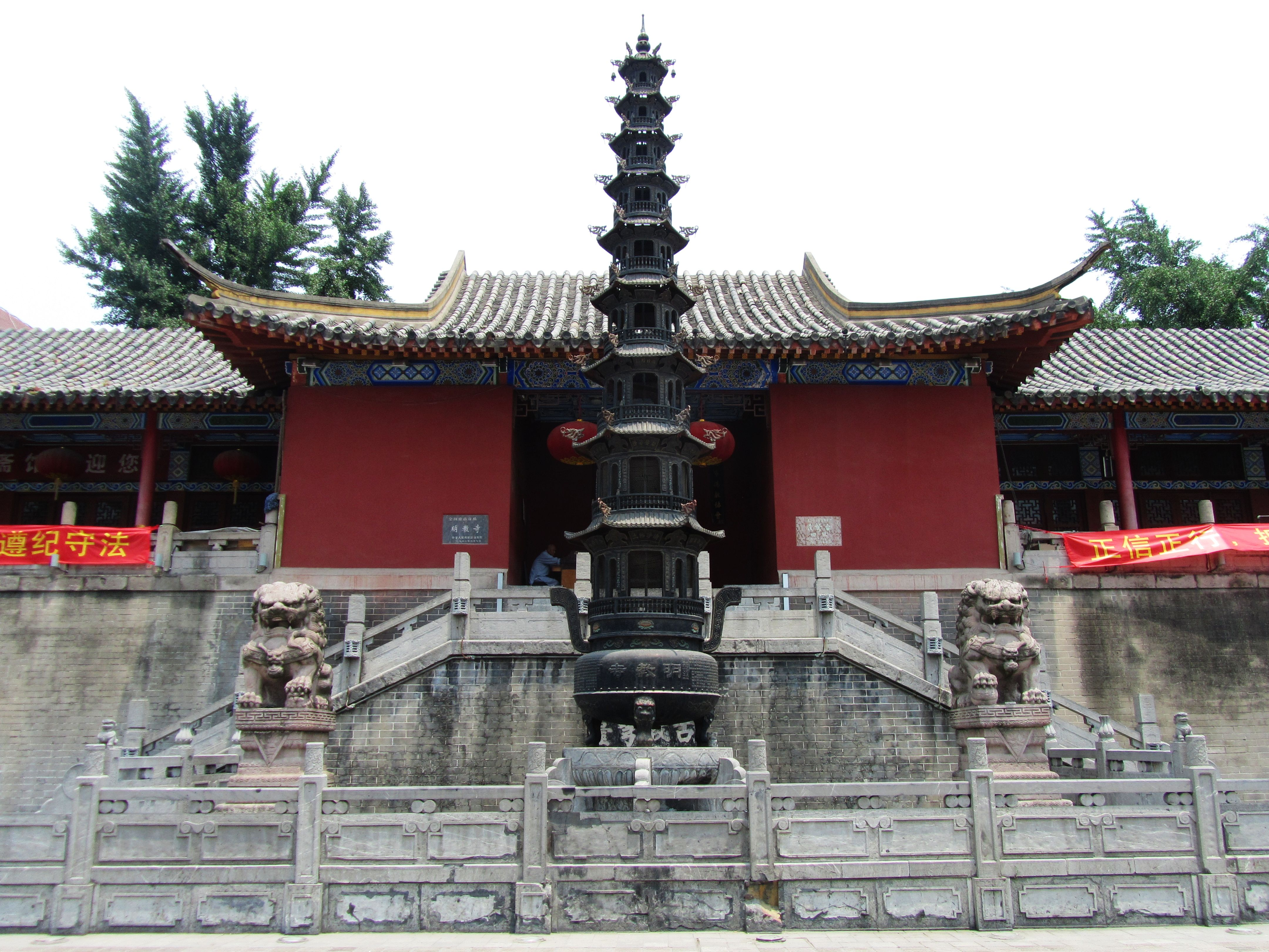 合肥明教寺，入口。